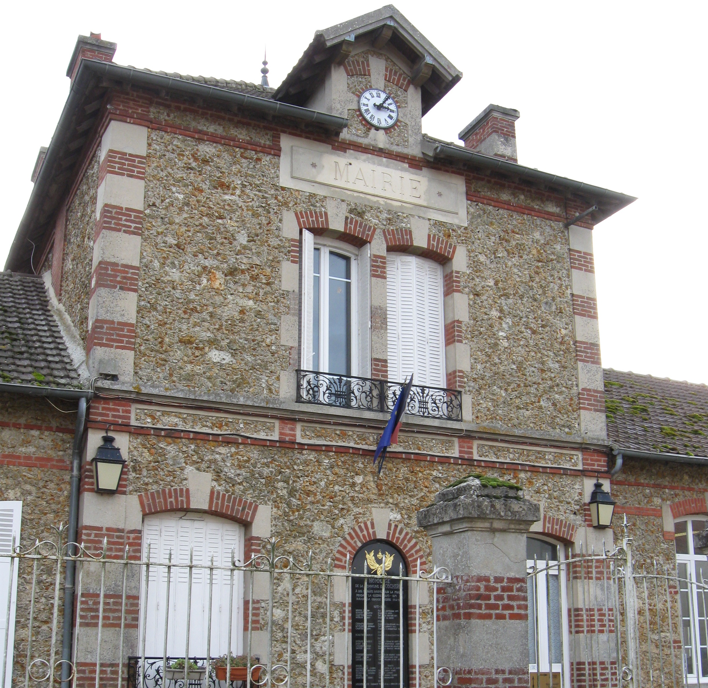 Mairie de Cocherel. (Seine-et-Marne, région Île-de-France).